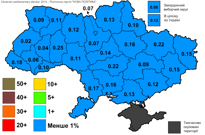 Результати виборів до Верховної Ради України, які відбулись 25 жовтня 2014 року. Інформація з офіційного сайту ЦВК. Політична партія "НОВА ПОЛІТИКА".